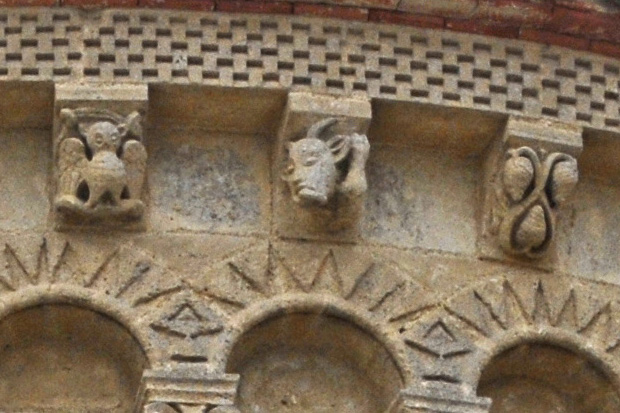 Sainte-Radegonde-Talmont-sur-Gironde, Traufgesims, Kragsteine